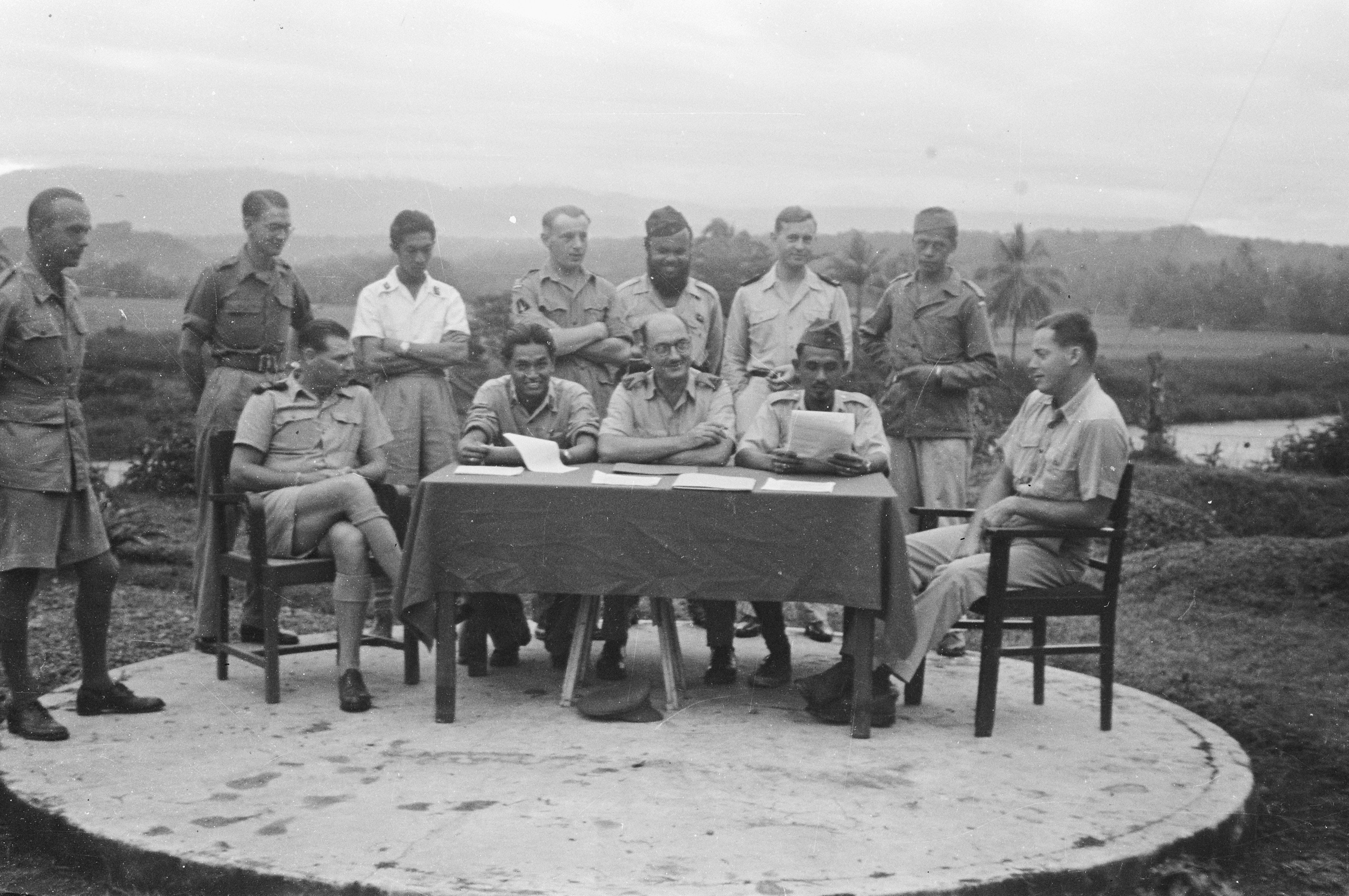 Collectie / Archief : Fotocollectie Dienst voor Legercontacten Indonesië Reportage / Serie : [DLC] Lahat, Martapoera, Pajakaboeng; ondertekening van de tekst van het bestand te Lahat Beschrijving : Lahat bij Palembang: Te Lahat werden besprekingen gevoerd tussen een Nederlandse en republikeinse delegatie over de uitvoering van de bestands-overeenkomst. Er werd een schriftelijke overeenkomst opgesteld, welke in de vroege morgen van 27 jan. door beide partijen werd getekend. [Beide delegaties en militaire waarnemers geschaard rond een tafel] Annotatie : Zittend vlnr. Capt. J. Rousset (Frankrijk, CGD), kolonel Simbolon, kolonel F. Mollinger, kolonel Kasim Hassan, Capt. J.A. Mac Naill (USA) waarnemer van de CGD. Achter hen zijn nog te zien de Republikeinse officieren Links de TNI. officieren, Kapt. Nursjirwan, Kapt. Rasjidi en Lt. Bangoun. Datum : 27 januari 1948 Locatie : Indonesië, Nederlands-Indië, Sumatra Fotograaf : Bosman / DLC Auteursrechthebbende : Nationaal Archief Materiaalsoort : Negatief (zwart/wit) Nummer archiefinventaris : bekijk toegang 2.24.04.03 Bestanddeelnummer : 1505-1-1